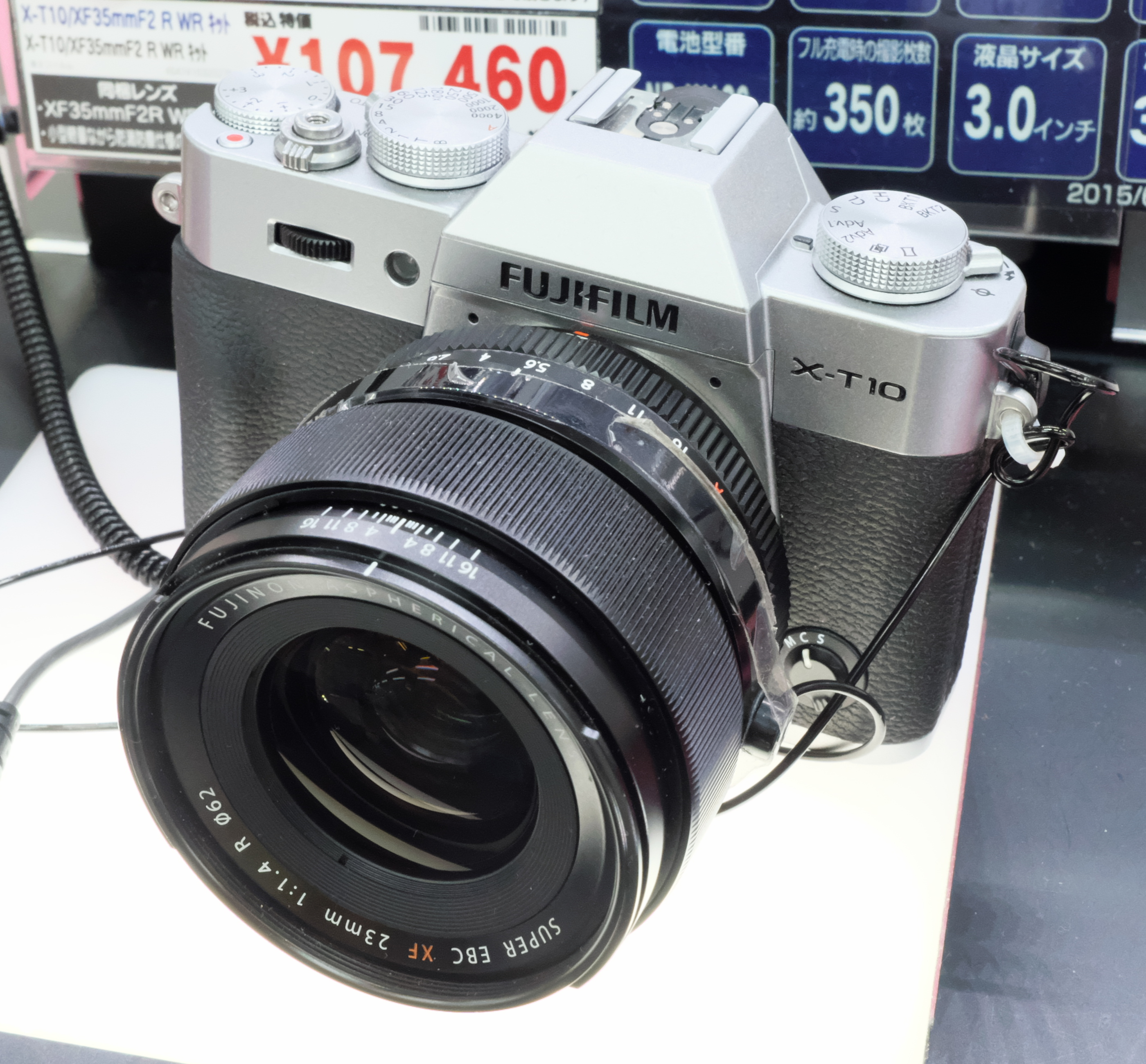 FUJIFILM X-T10（ヨドバシカメラにて撮影）